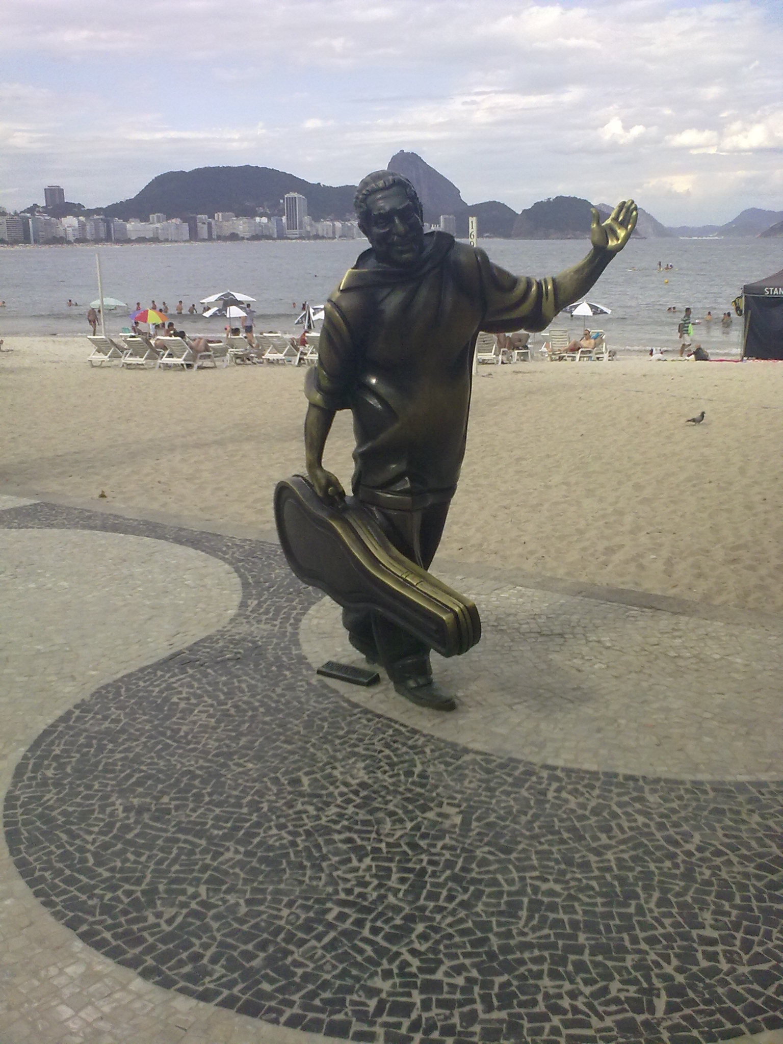 Copacabana - Rio de Janeiro